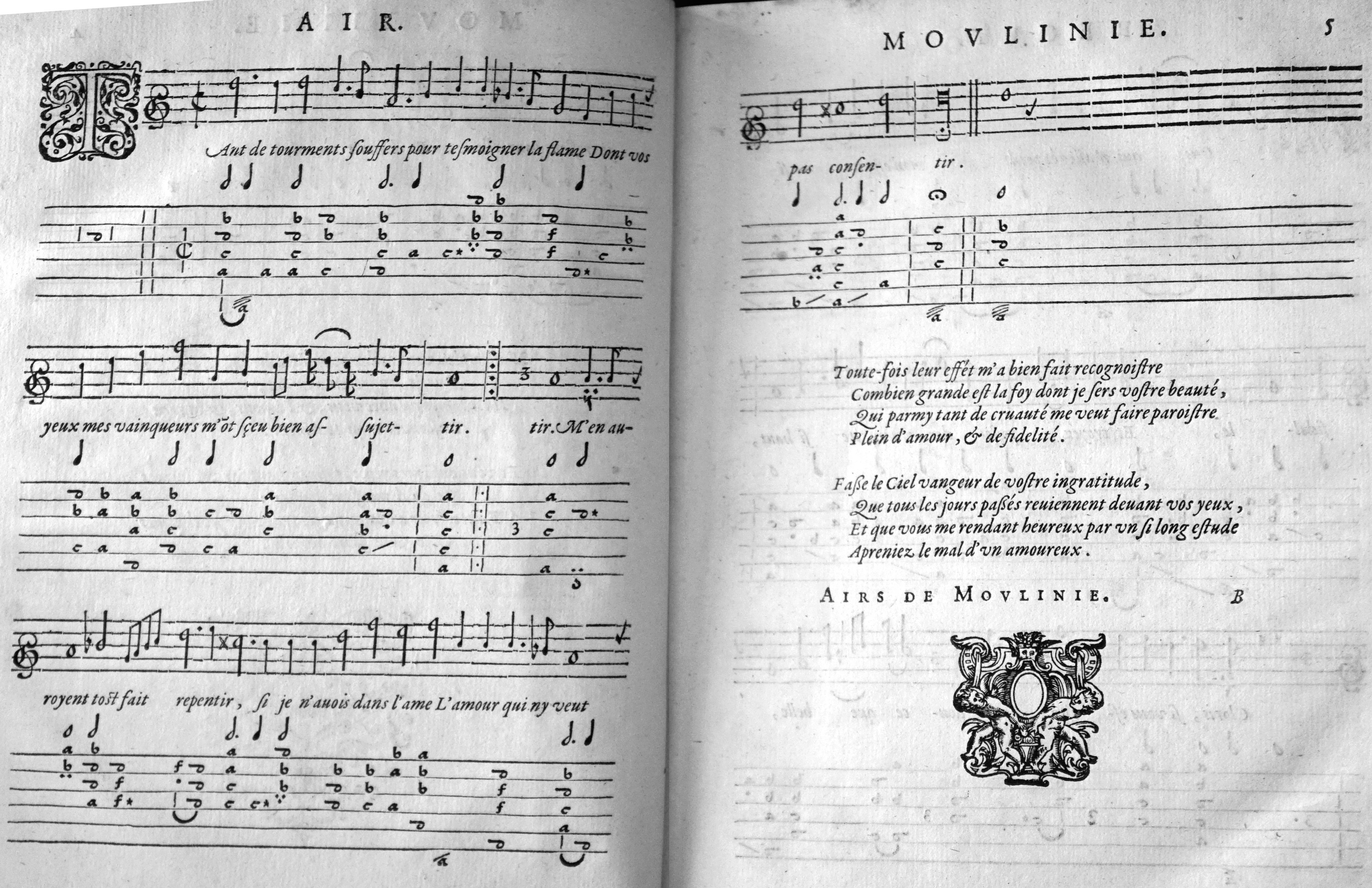 Airs de cour de E. Moulinié imprimé à Paris.